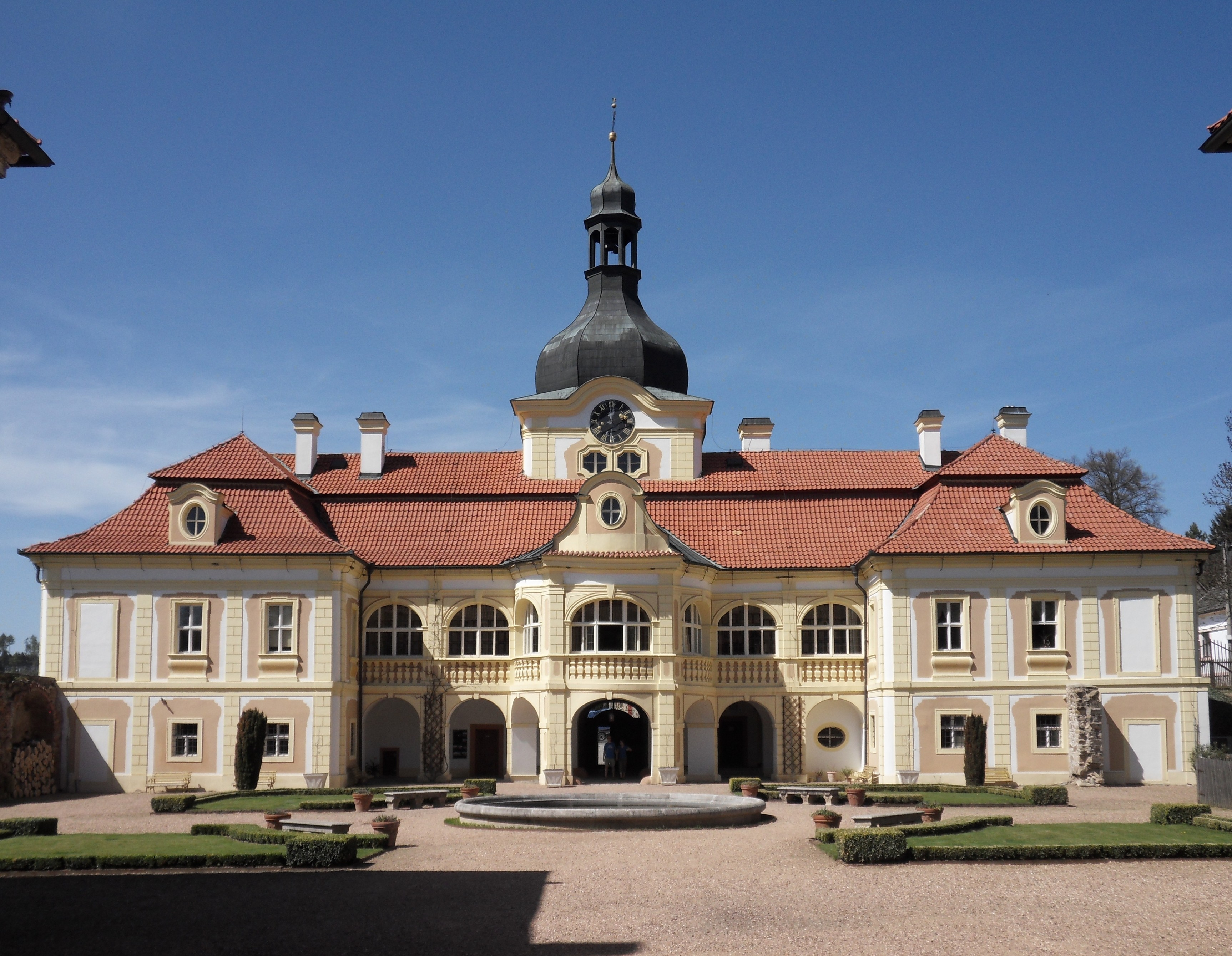 Zámek Nebílovy, pohled z nádvoří na severozápadní část